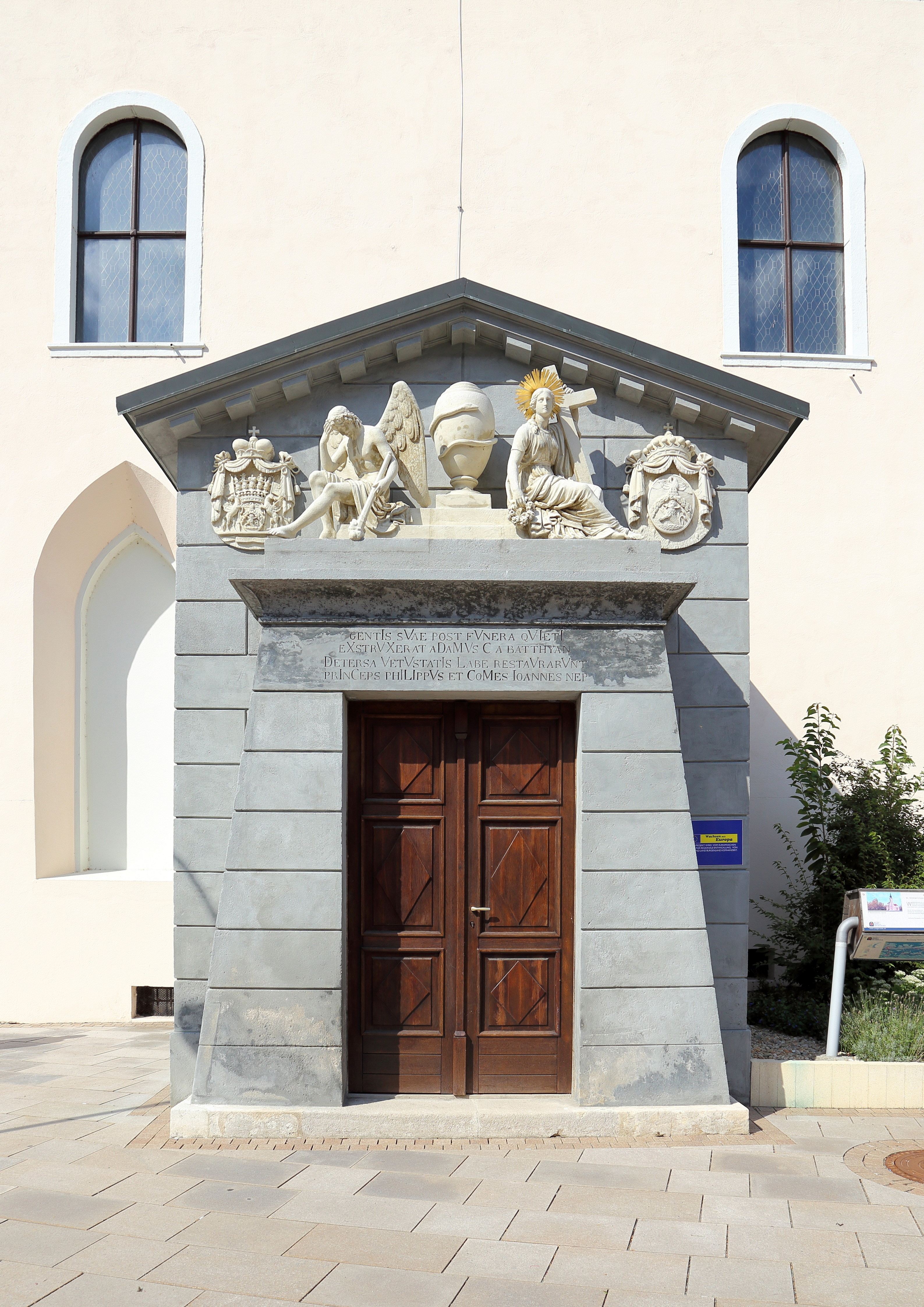 Portal der Batthyány´sche Familiengruft an der Südseite der Klosterkirche in der burgenländischen Bezirkshauptstadt Güssing. Nach der Kapuzinergruft in Wien ist diese die zweitgrößte Gruft in Österreich. Gegründet wurde sie 1648 und beinhaltet rund 100 einfache Särge sowie den bemerkenswerten Bleisarkophag Karl Joseph Batthyany.